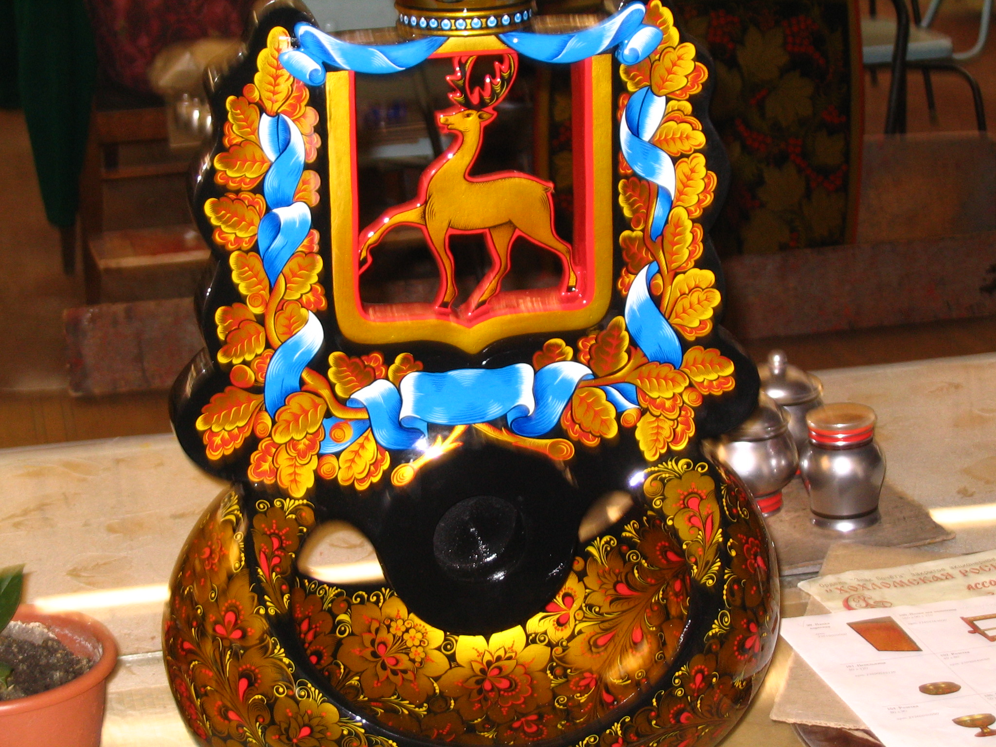 Хохломская роспись